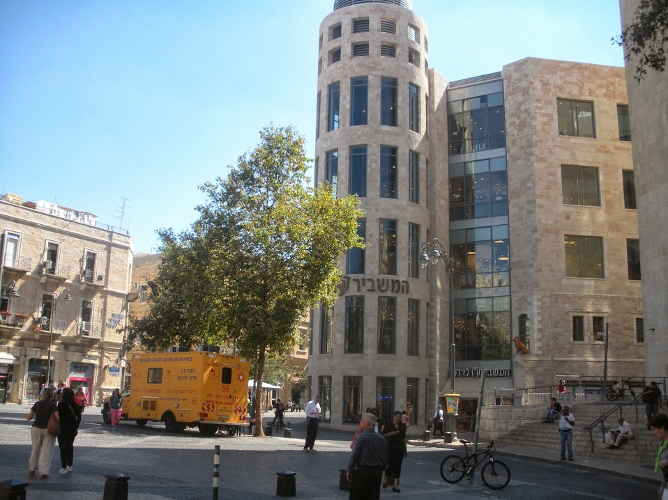 Кикар Цион, машбир